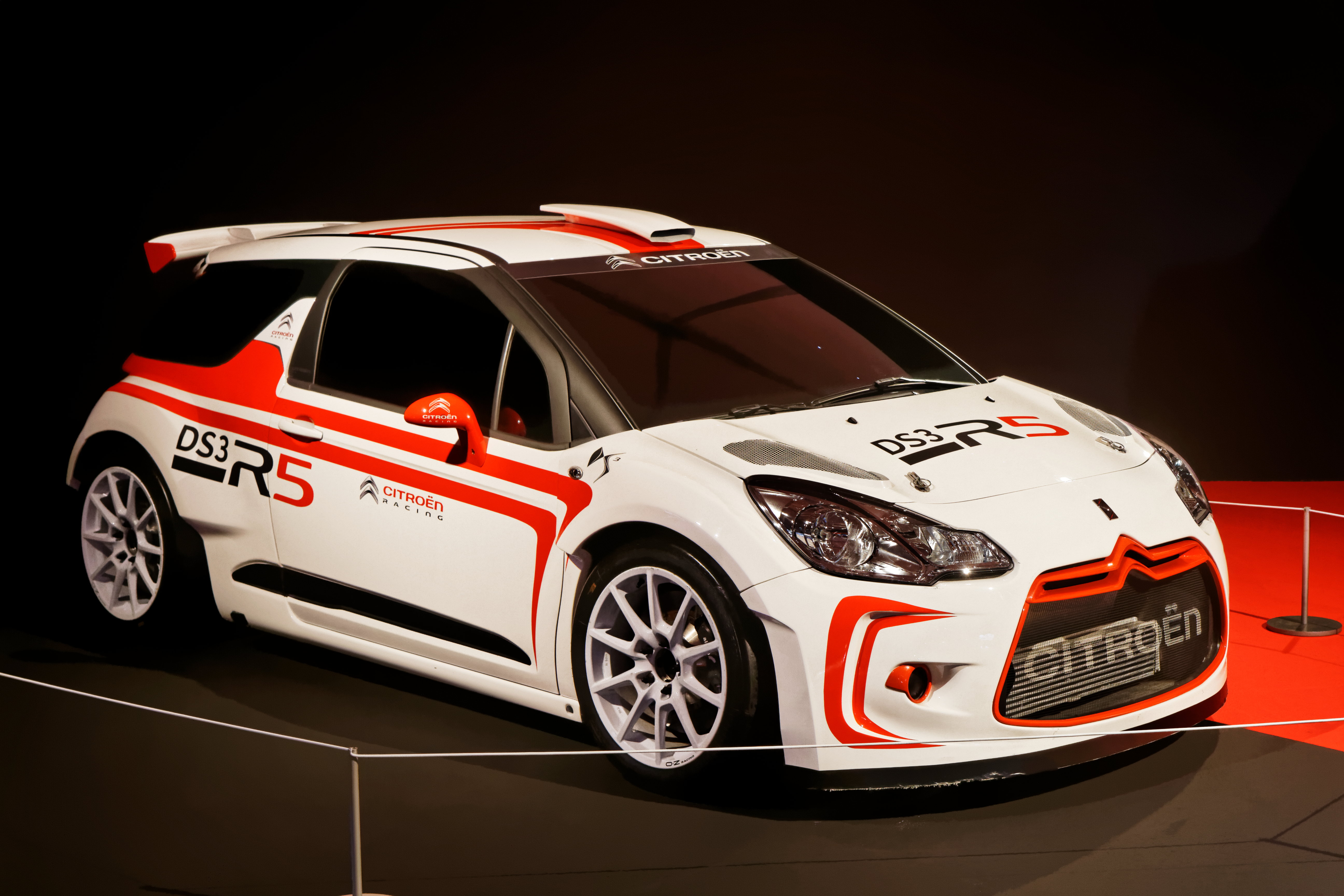 La Citroën DS3 WRC exposée lors du festival automobile international 2014.